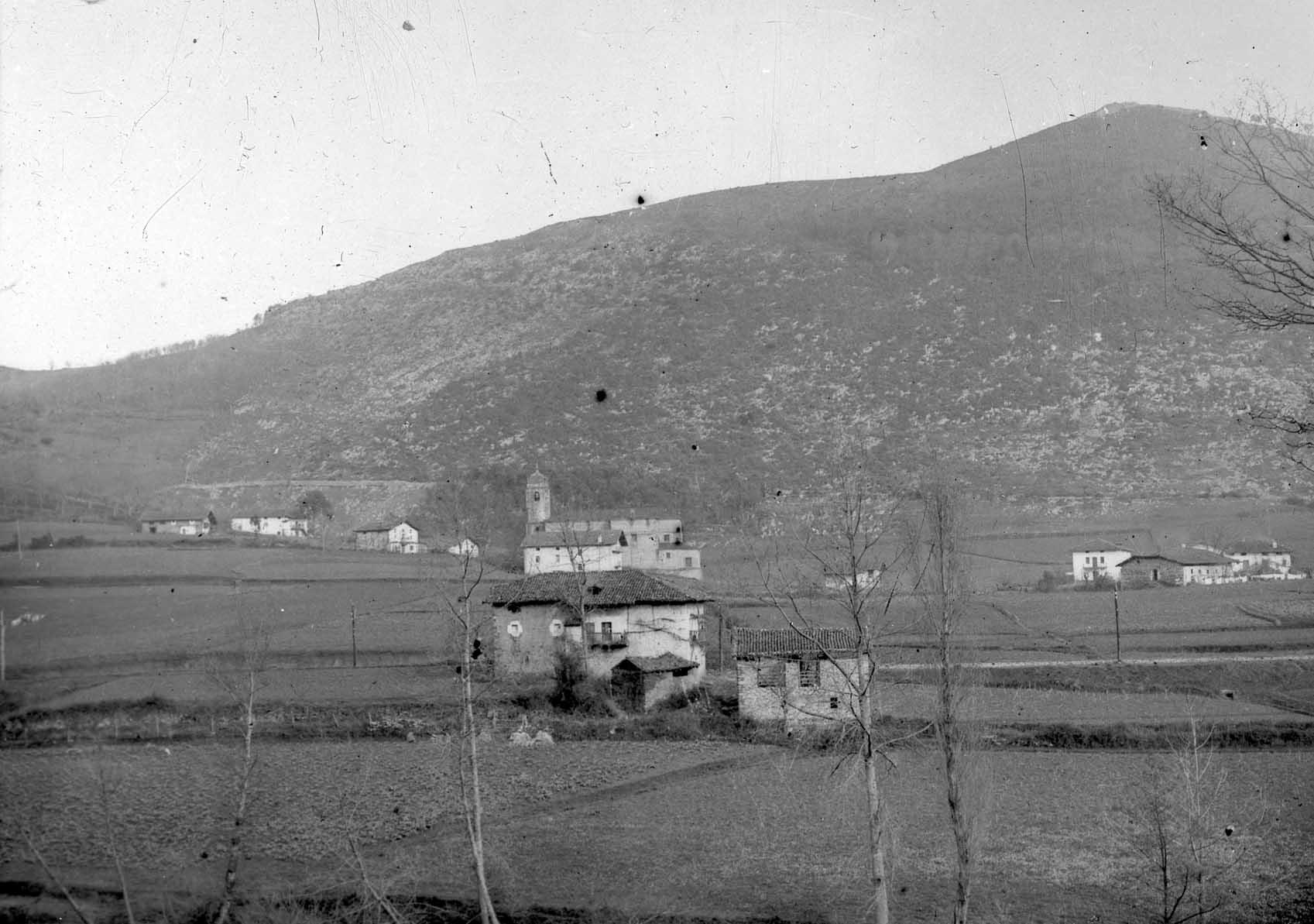 Lemoa herria 1930eko hamarkadan